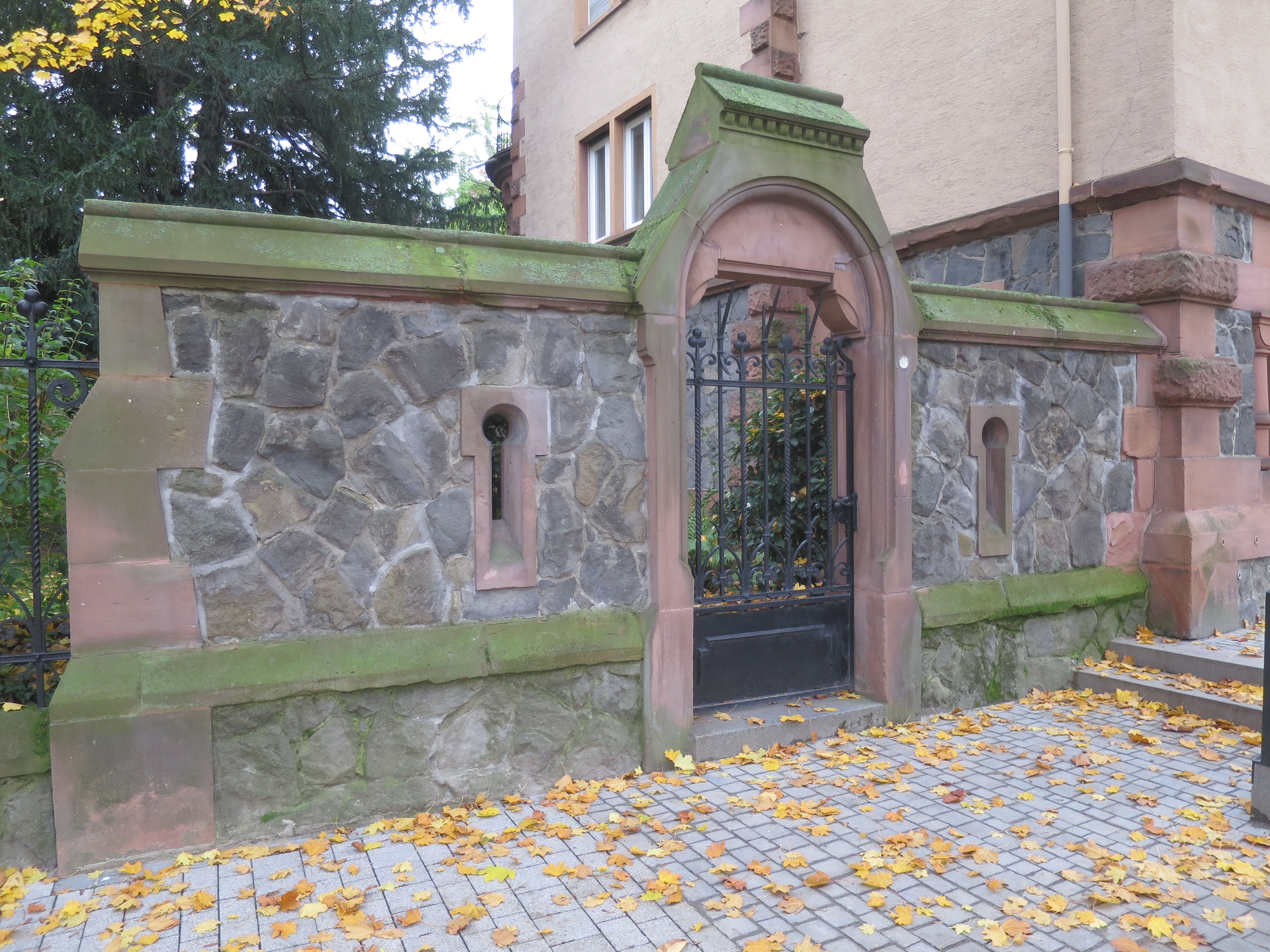 Villa Werger: Mauerimitat entlang des ehemaligen Verlaufs der Westmauer der inneren Stadtbefestigung